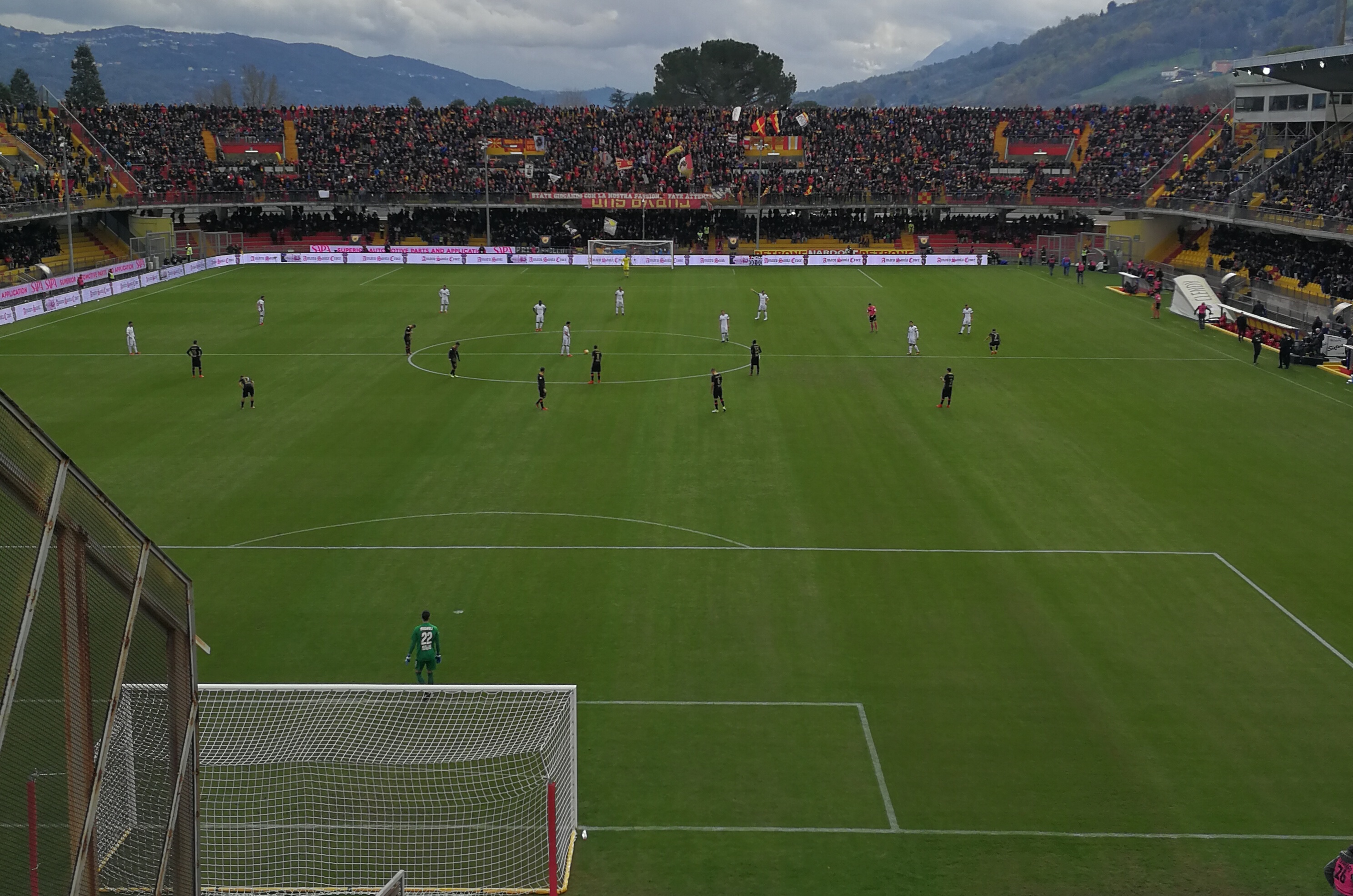 Calcio di inizio della partita Benevento - Milan 2-2